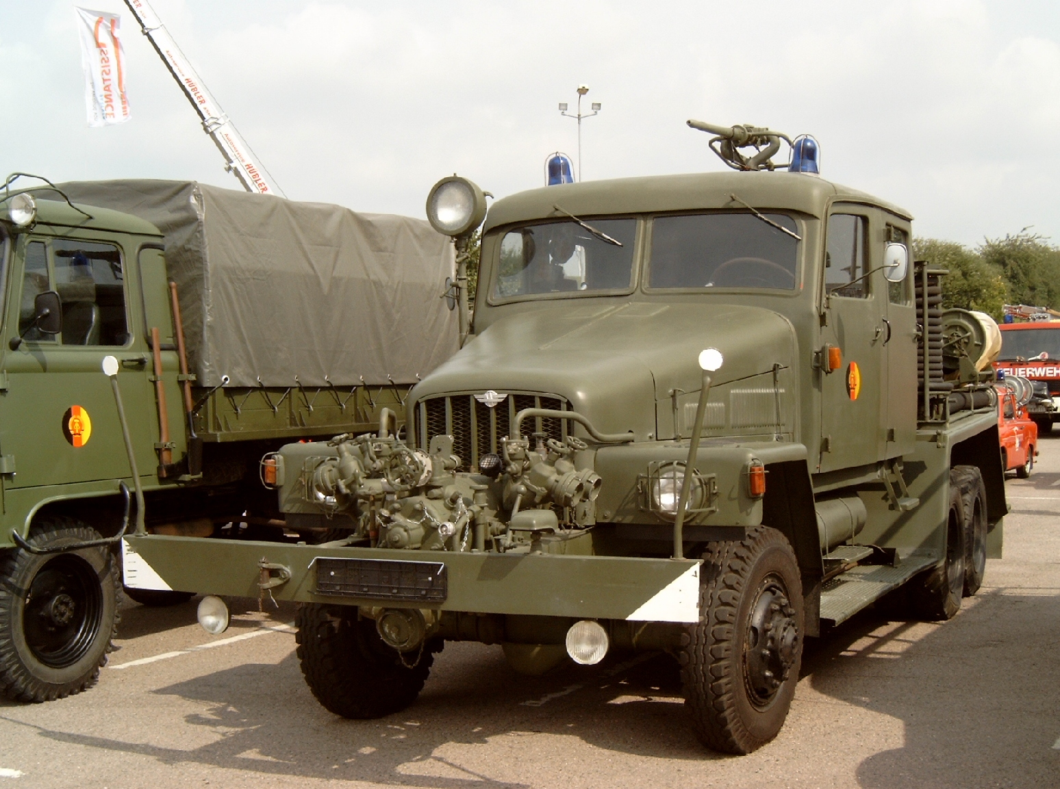 Tanklöschfahrzeug 15 auf IFA G5 der Nationalen Volksarmee.